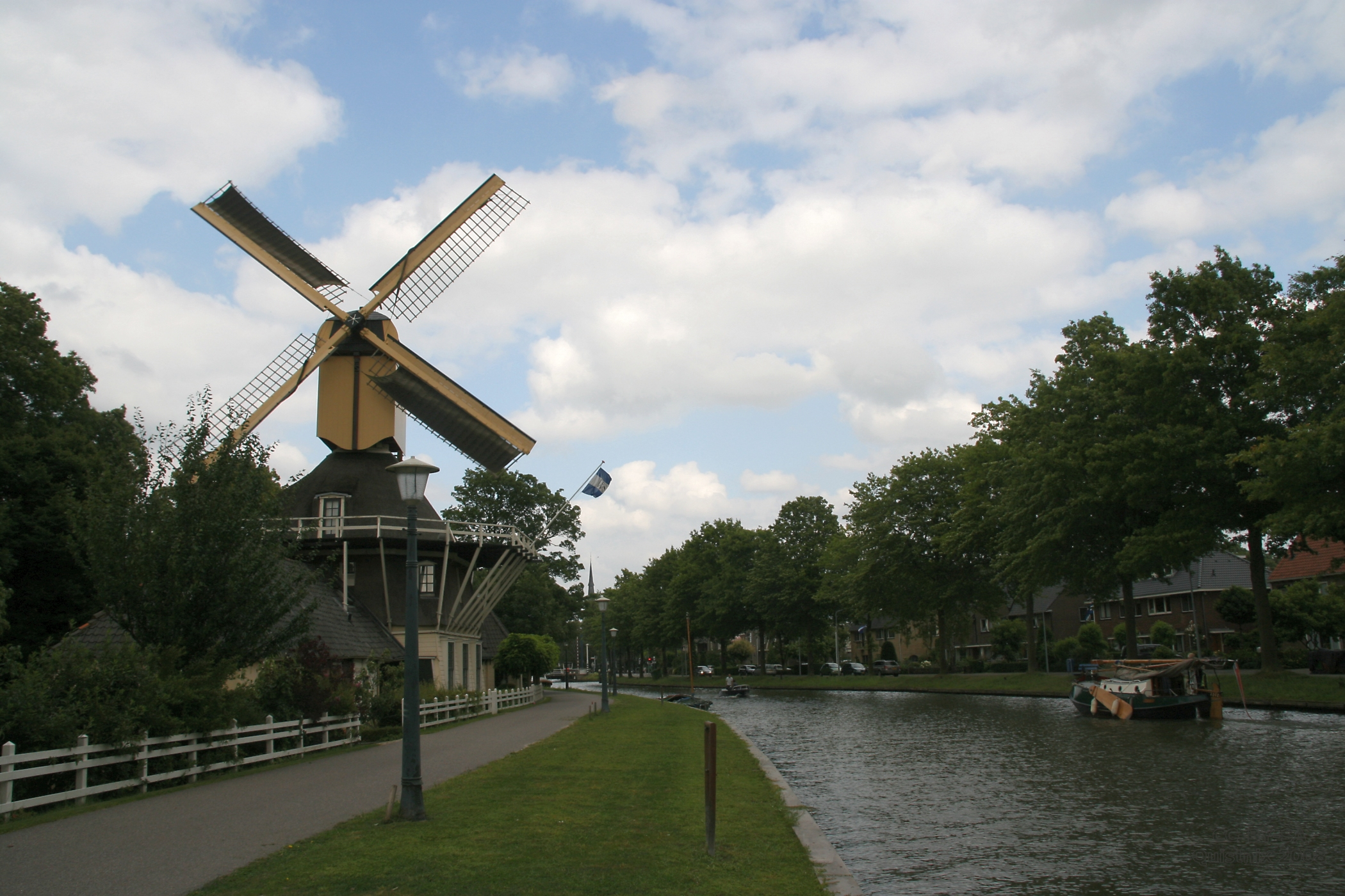 Weeap: molen 't Haantje met 2 zeilen